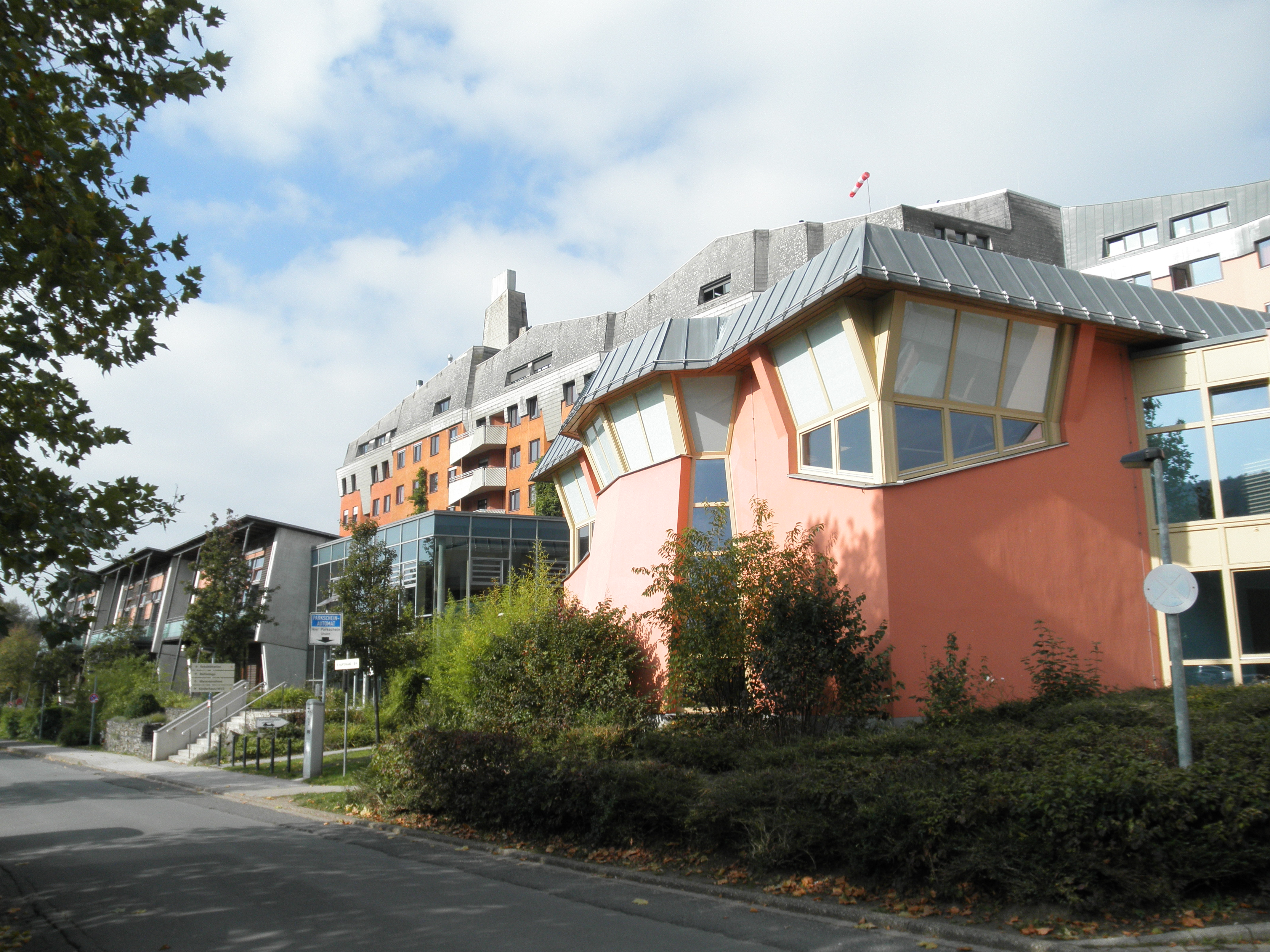 das antroposophische Gemeinschaftskrankenhaus Herdecke im Herbst 2010